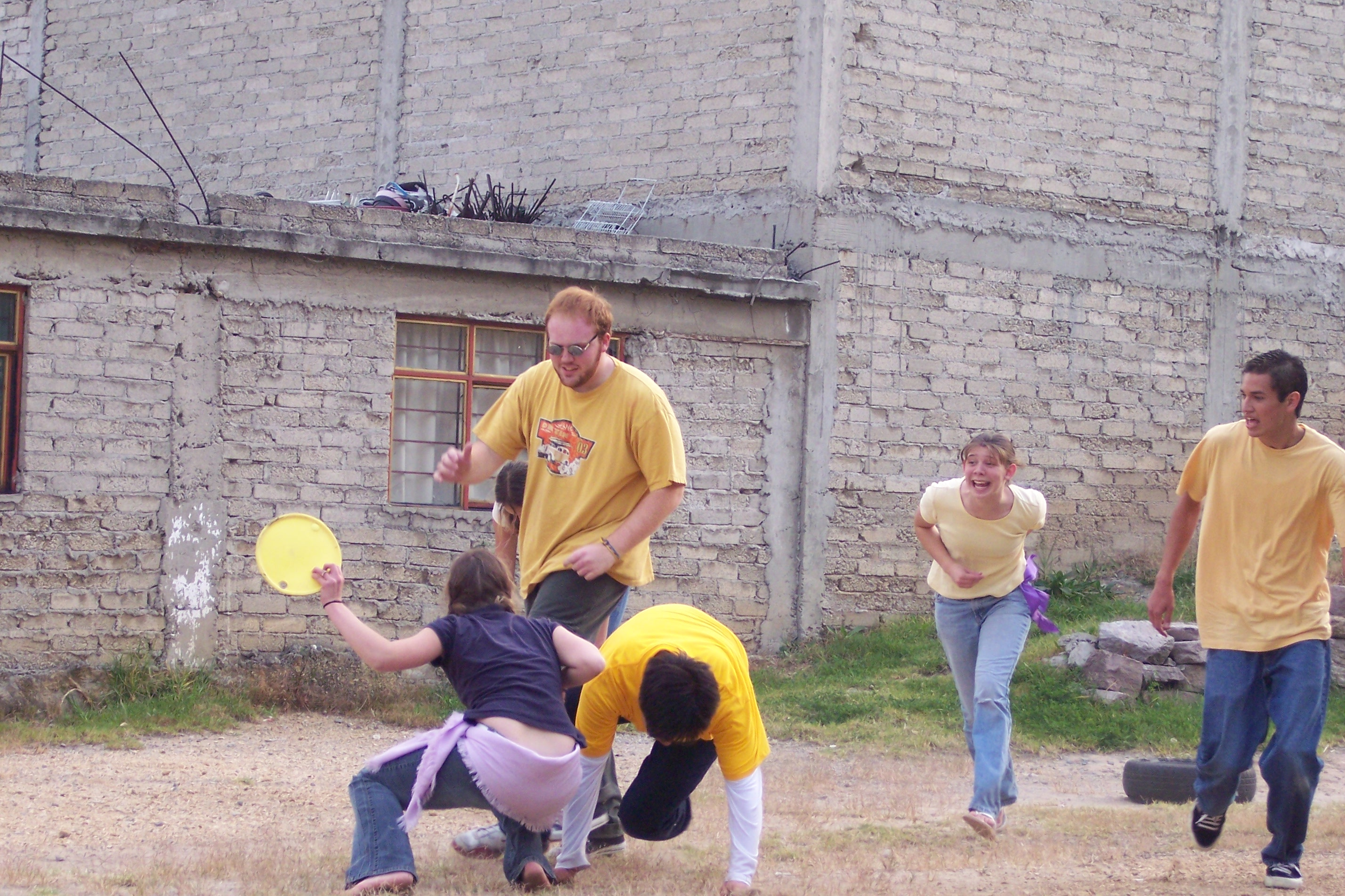 Frisbee game